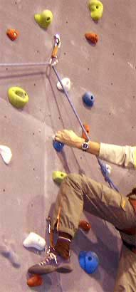 Foto sobre presas y seguro de rocodromo. Rocodromo de Torrejon de Ardoz. Foto realizada por Fjbombinl, colaborador de este articulo.